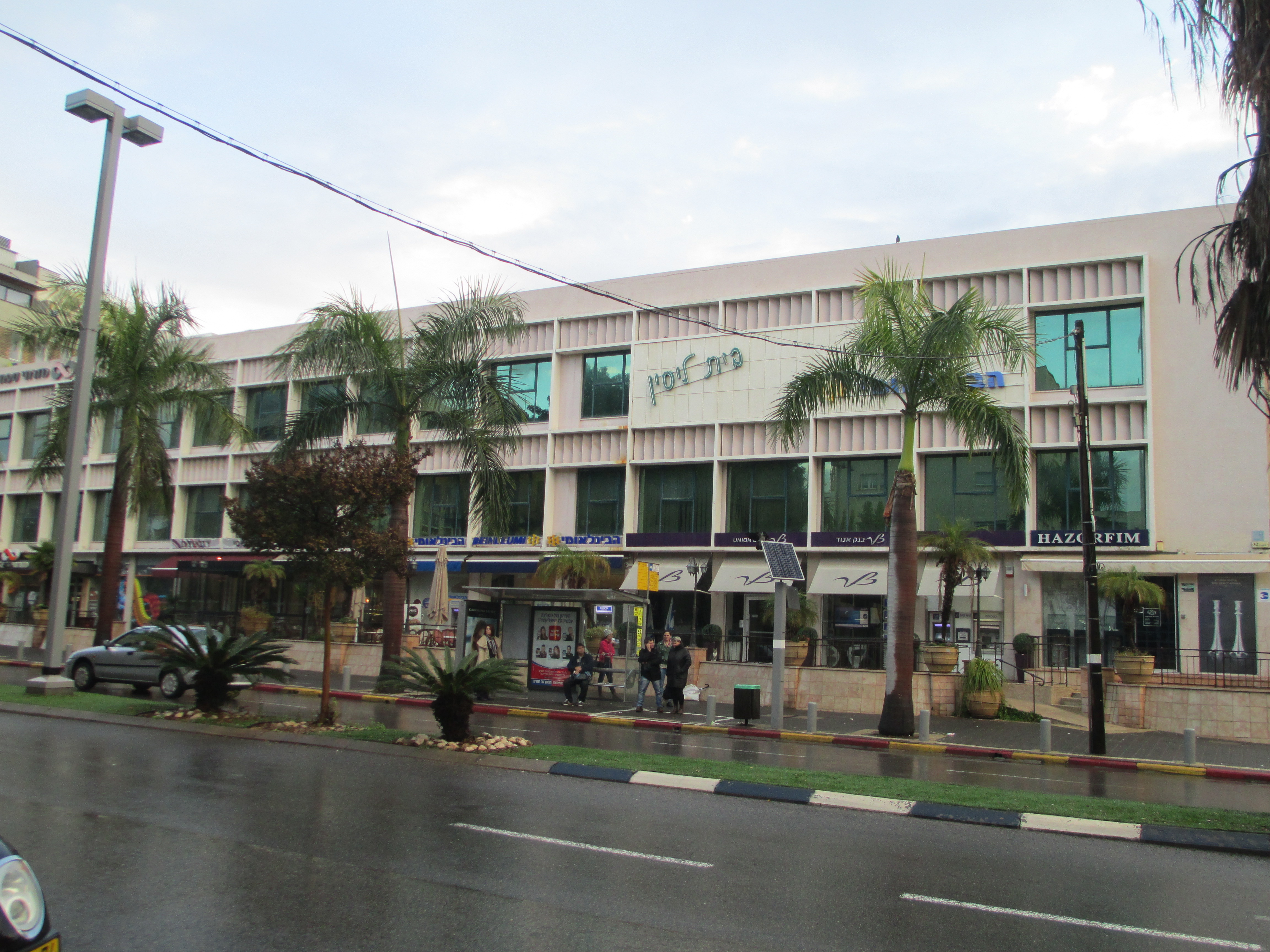 הבית הקודם של תיאטרון בית לסין ברח' ויצמן בתל אביב